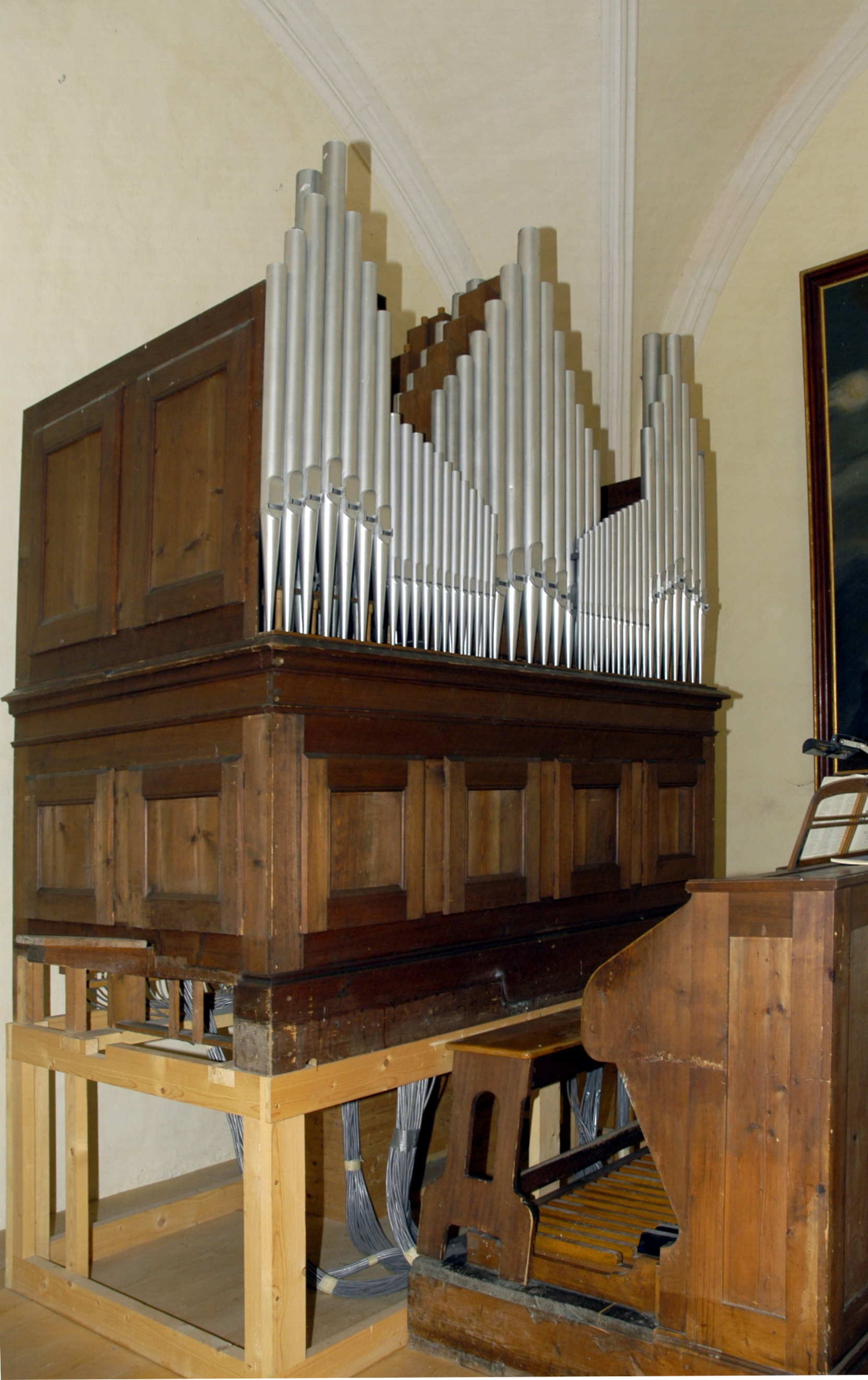 Schrattenthal - Orgel der Firma Kauffmann (Wien) aus dem Jahre 1934 in der Schlosskapelle Dieses Bild wurde anlässlich des österreichischen Tags des Denkmals 2012 in Niederösterreich eingereicht.